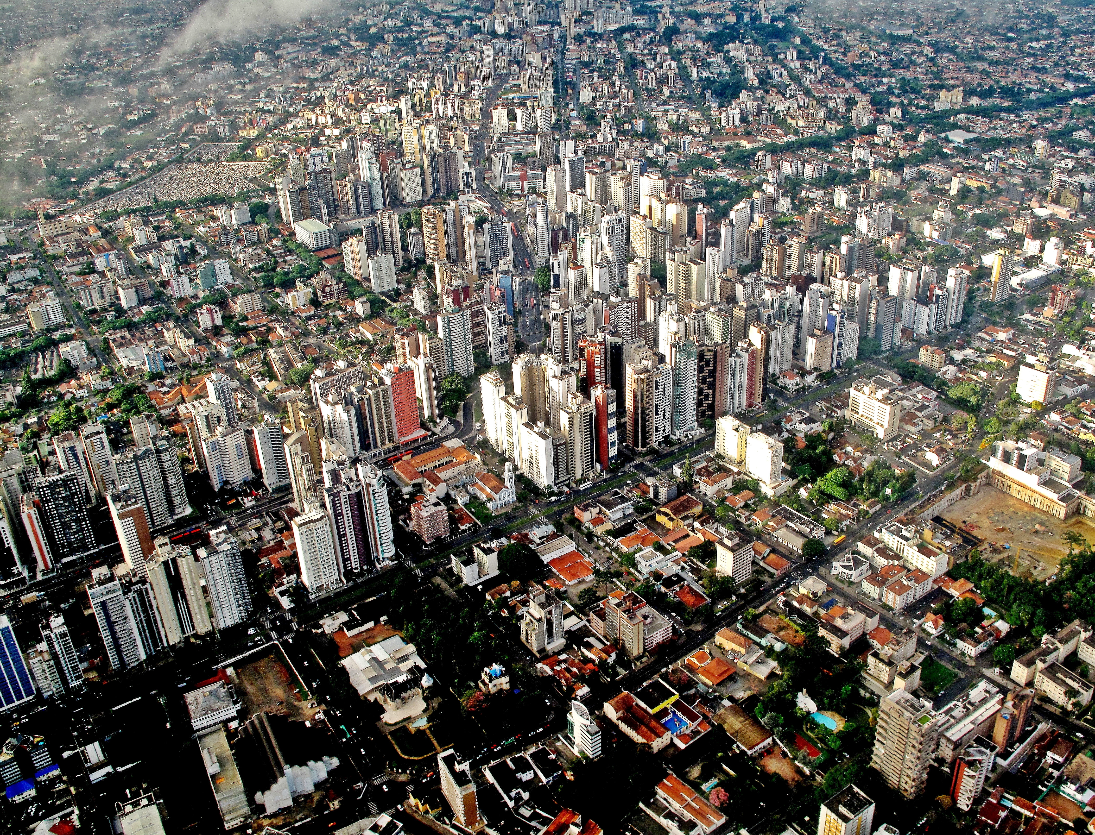 Curitiba - Batel/Água Verde